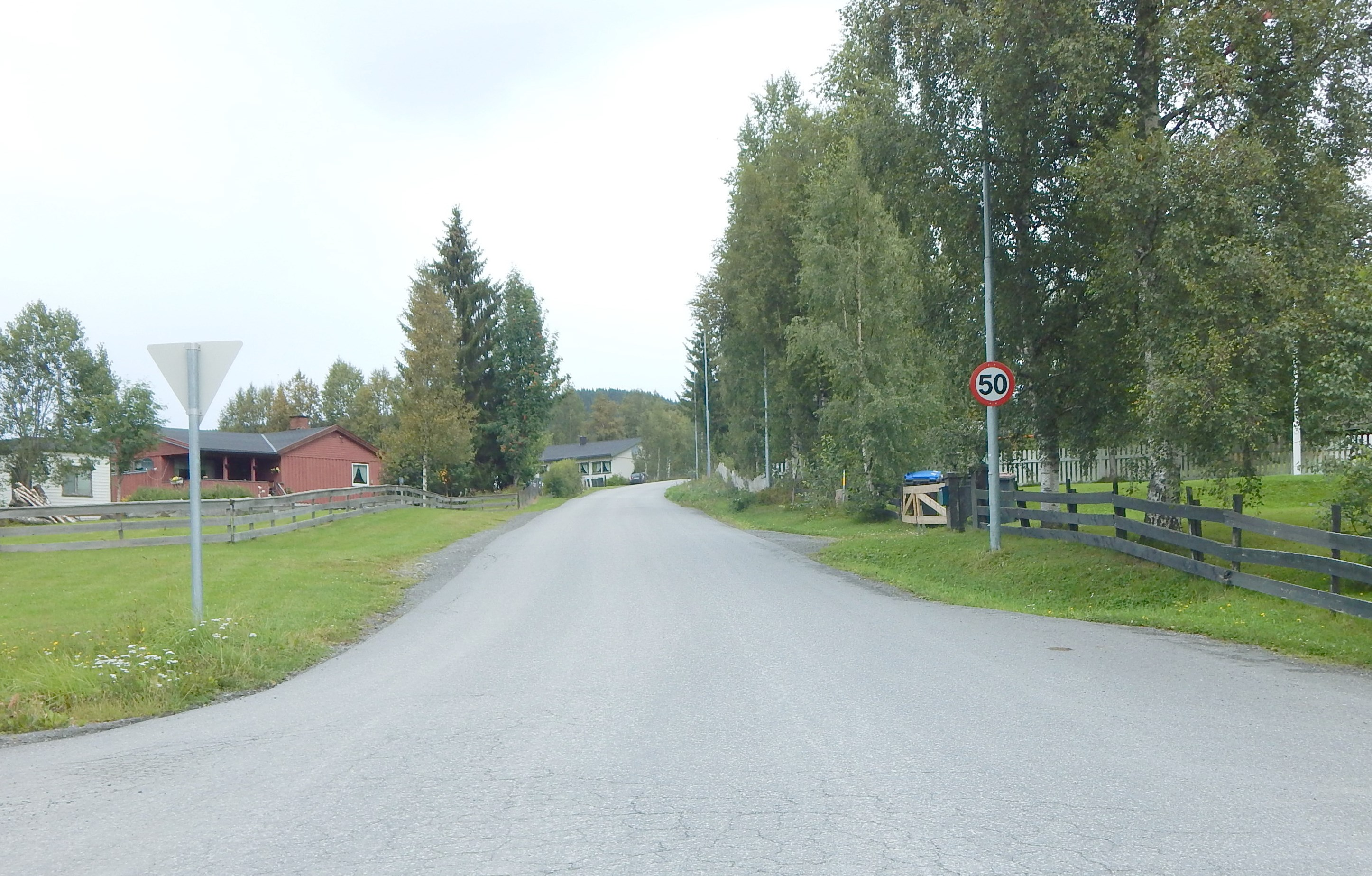 Rødumsbygdsvegen (fylkesvei 2546, tidl. 338) på Svingvoll